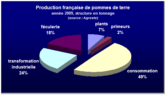 Graphique montrant la structure en tonnage par type de produits de la production française de pommes de terre en 2009 (données provisoires, source Agreste - ministère de l'Agriculture)